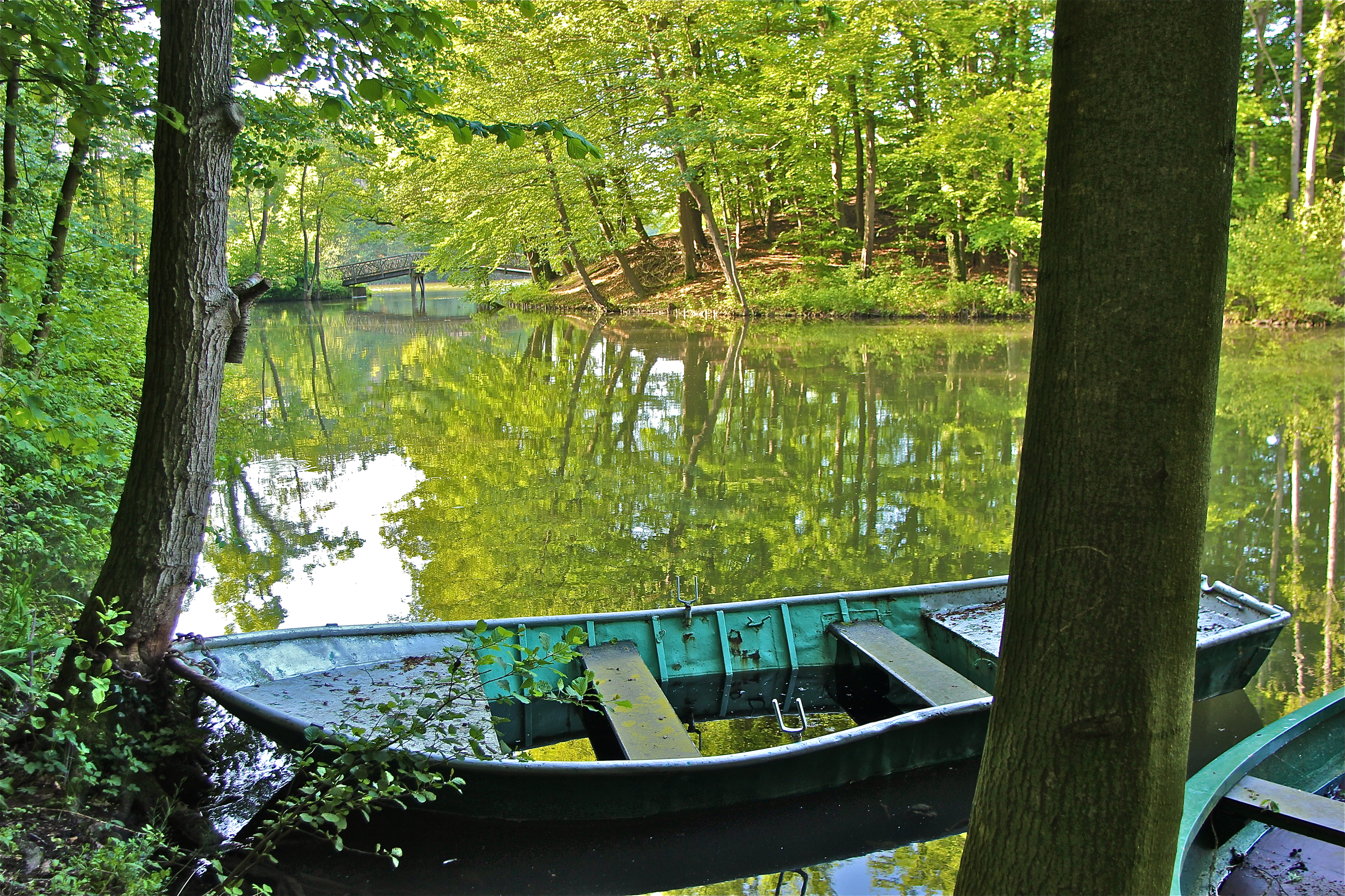 Blick über den Bagno-See